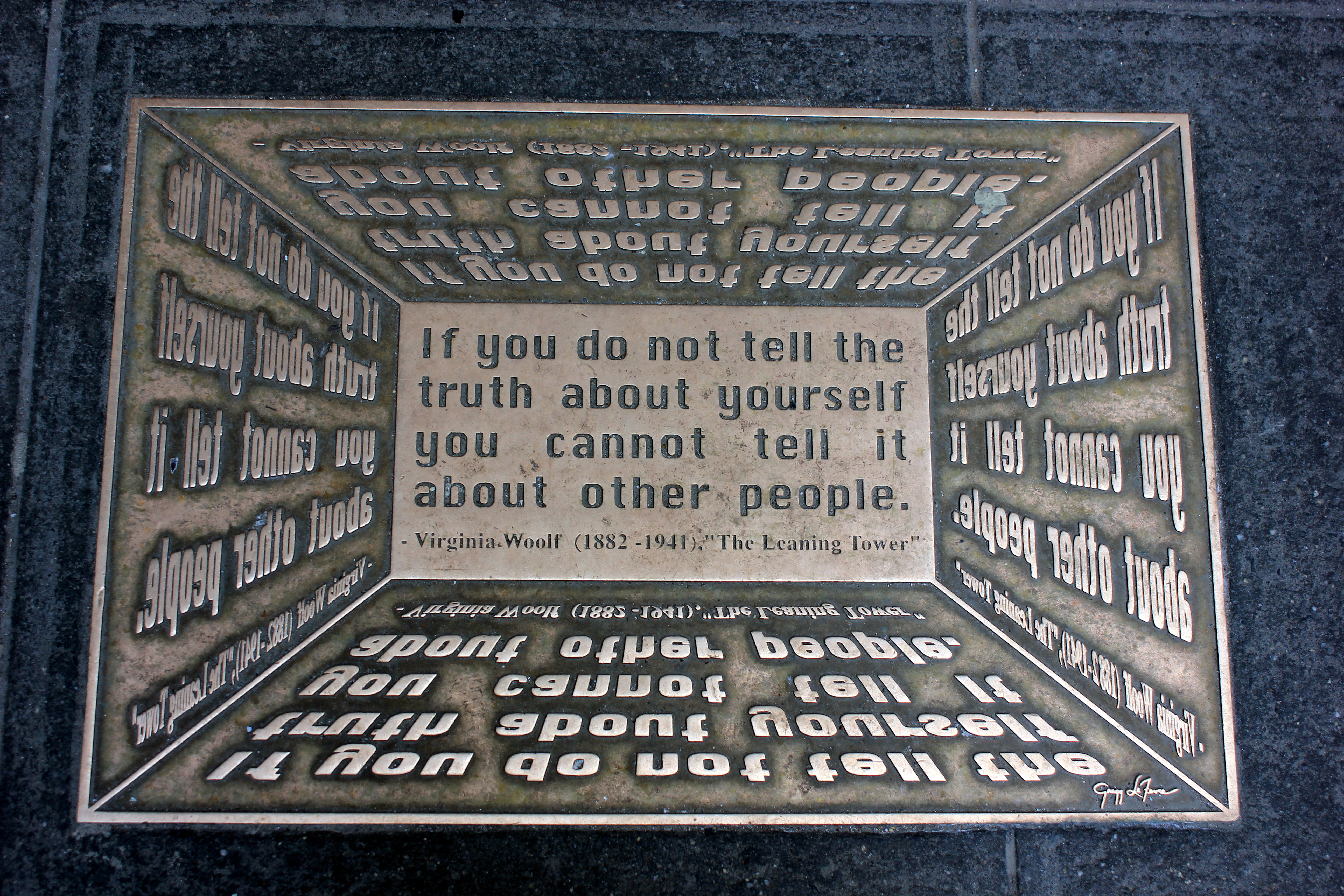 Library Walk in New York City